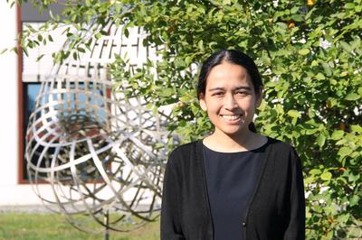 Jennifer Balakrishnan at Oberwolfach (2018)